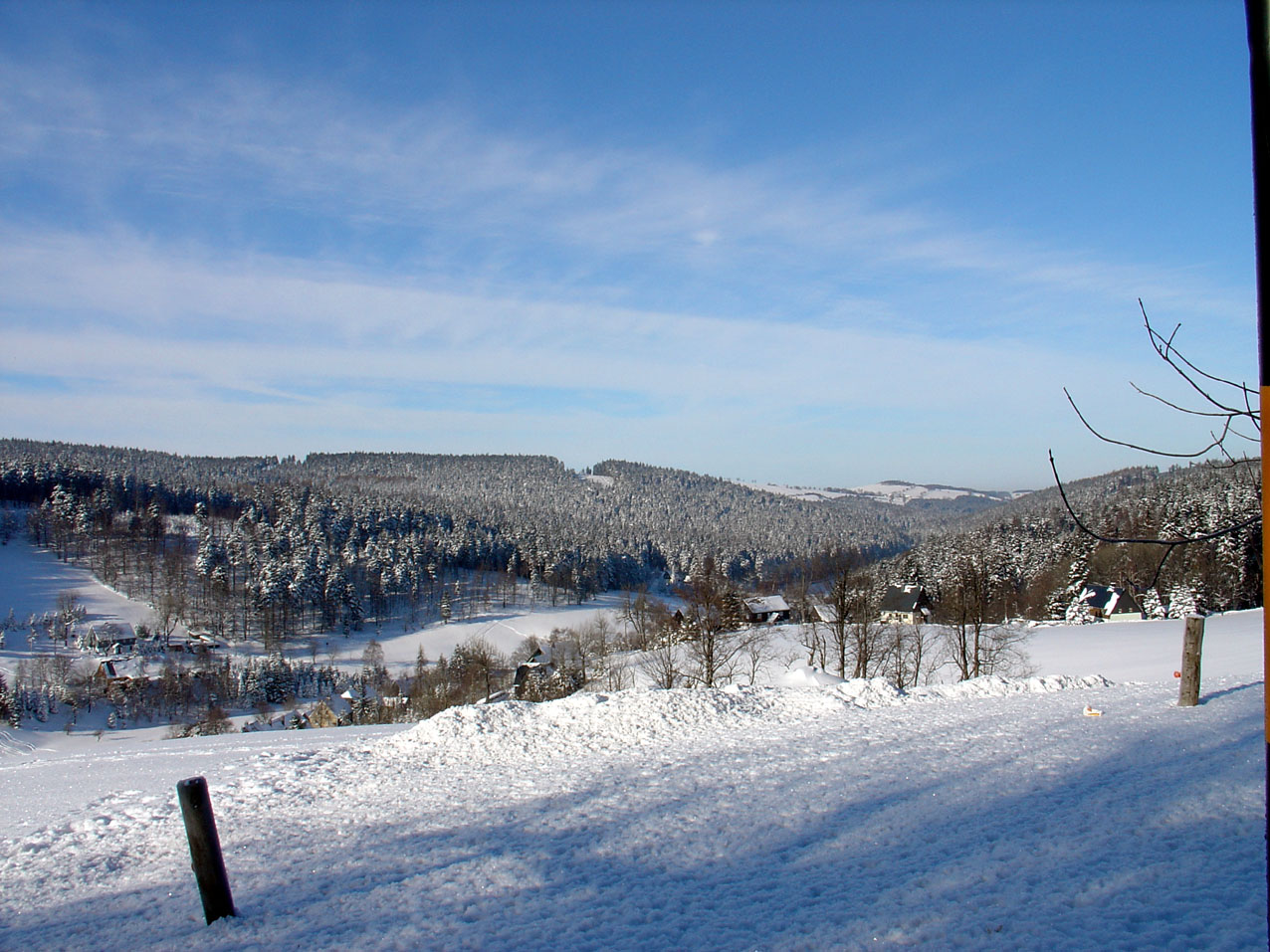 Rehefeld (Sachsen, Erzgebirge) im Winter